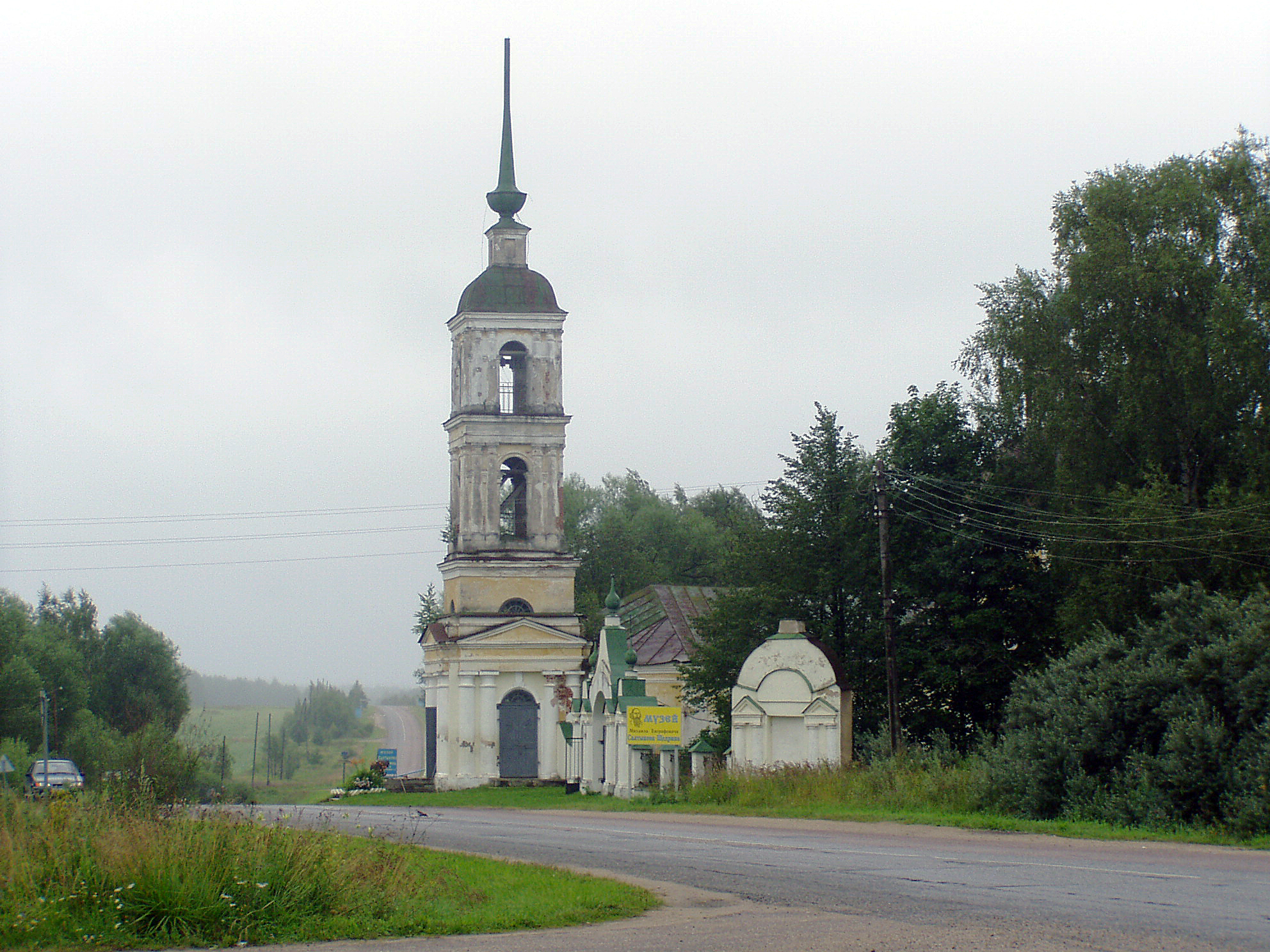 Церковь Спаса Преображения (Москва и Московская область, Калязин, село Спас-угол)